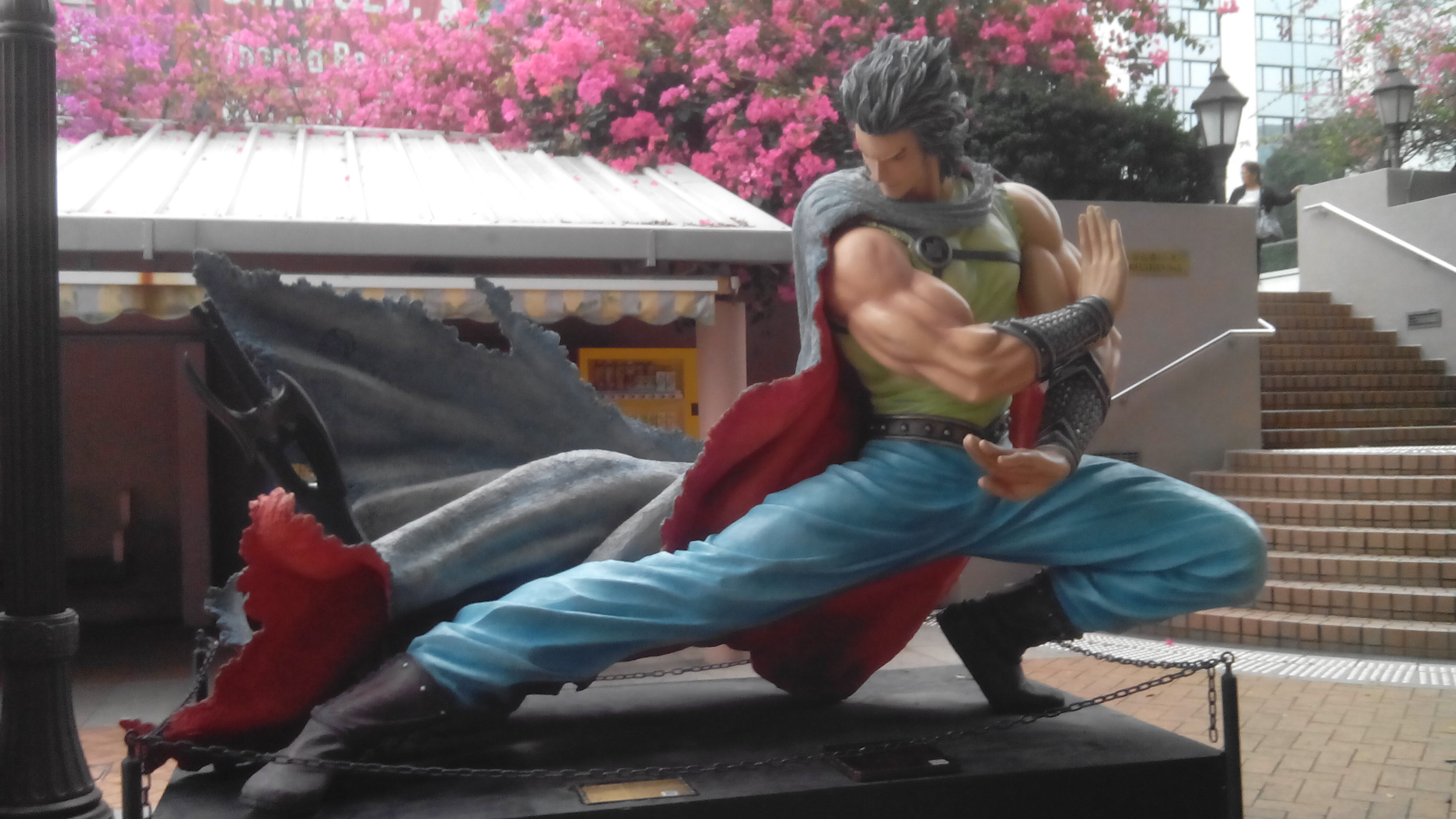 《風雲》主角-步驚雲